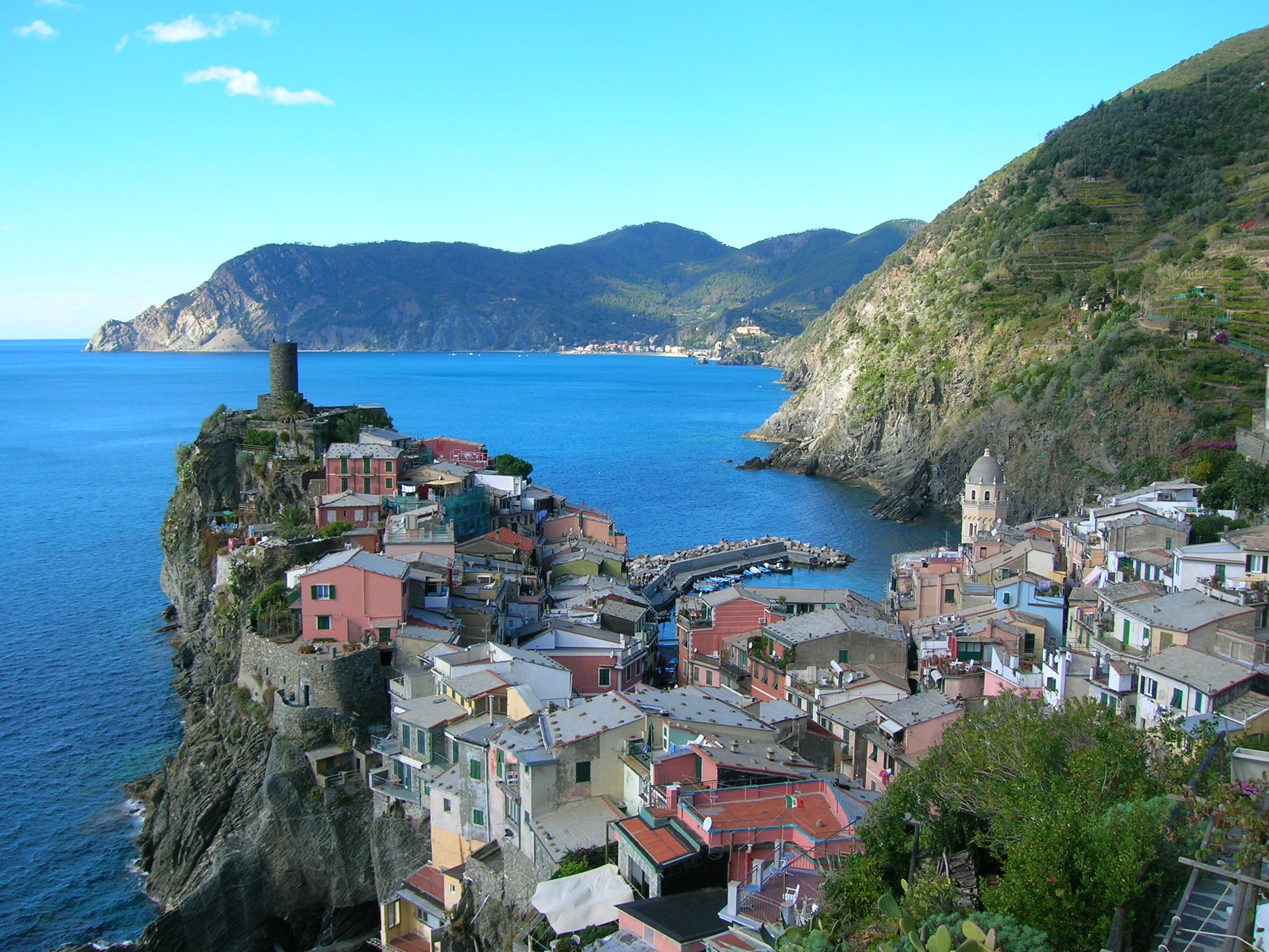 Vernazza landscape